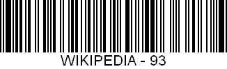 Strichcode-Beispiel: Code93 "Wikipedia - 93"